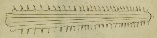 Рострум обыкновенного пилорыла